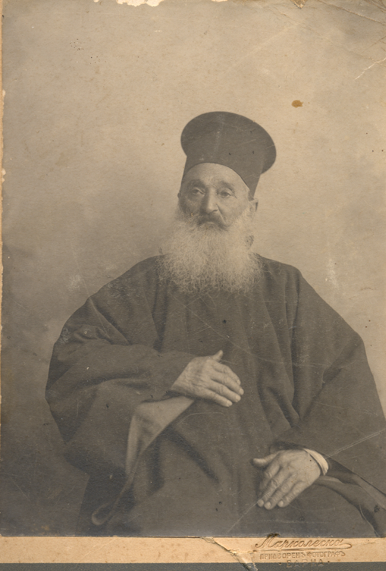 Снимка на Константин Дъновски. Ръкоположен за свещеник през 1857 в с. Хадърча (Николаевка), от 1865 първи български свещеник във Варна.